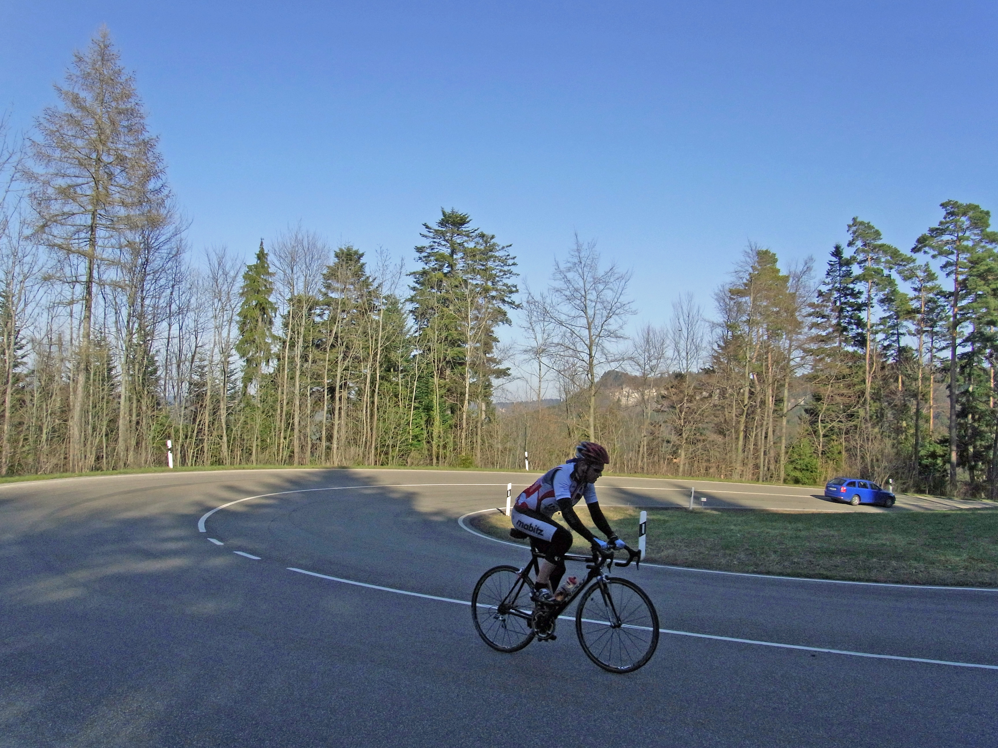 Lochenpass Letzte Kurve